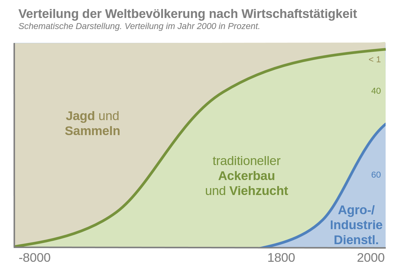 Schematische Darstellung der verschiedenen Subistenztätigkeiten.